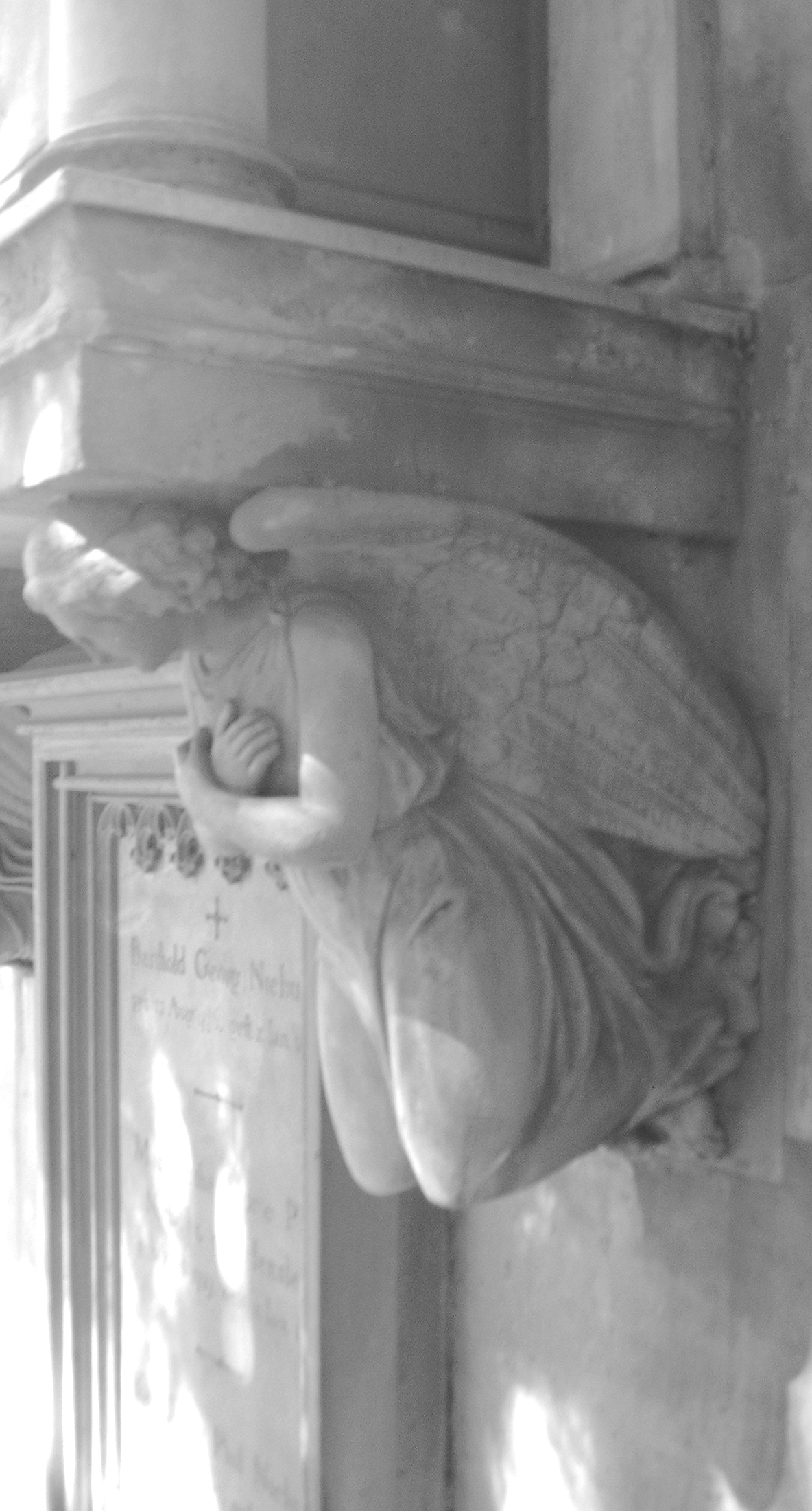 Engelskonsole – Ausschnitt aus dem Grabdenkmal für das Ehepaar Niebuhr auf dem Alten Friedhof in Bonn